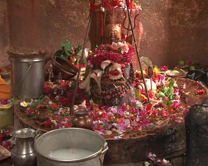 नेपाली: कुशेश्वर